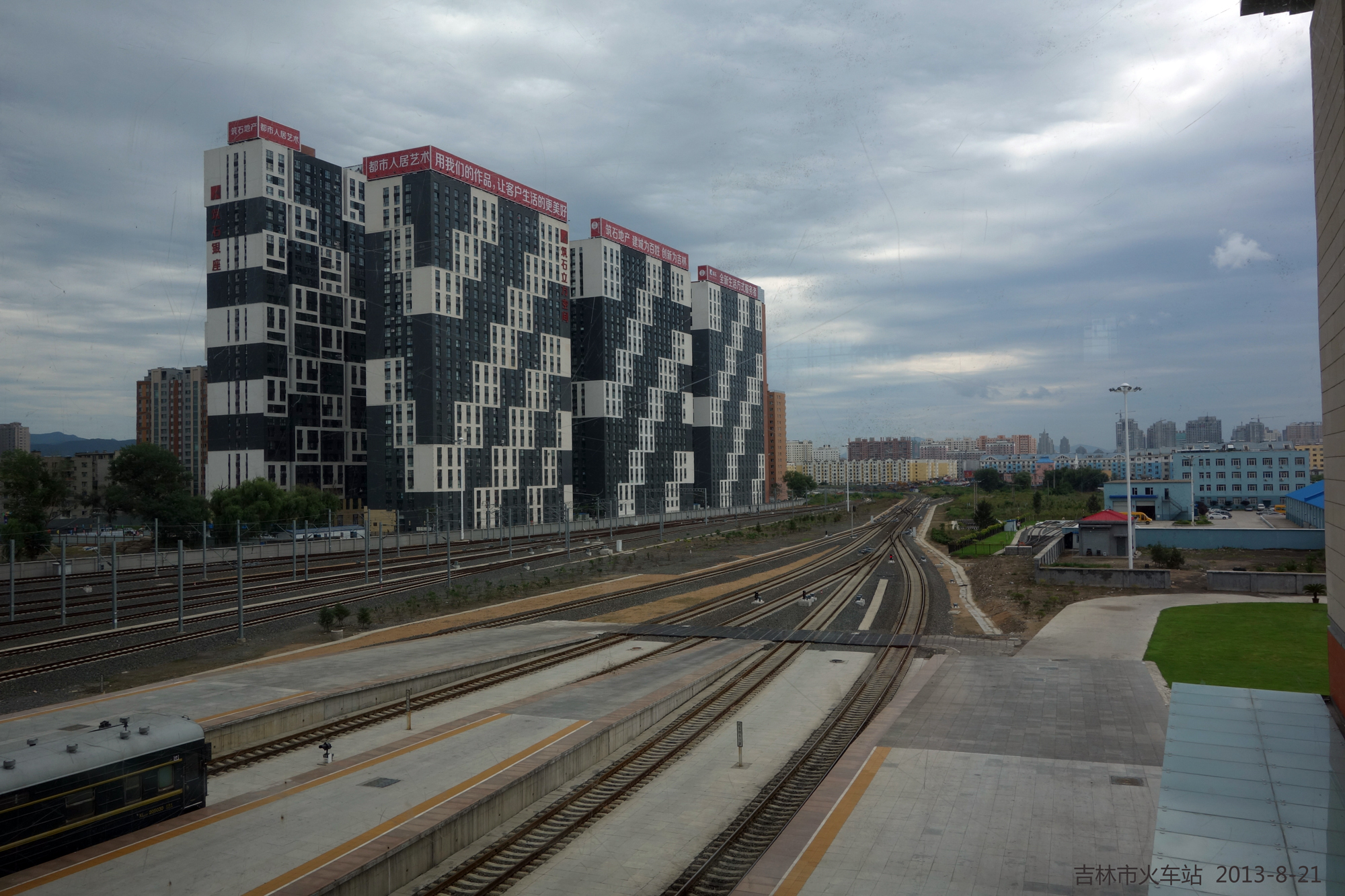 吉林市火车站 ji lin shi